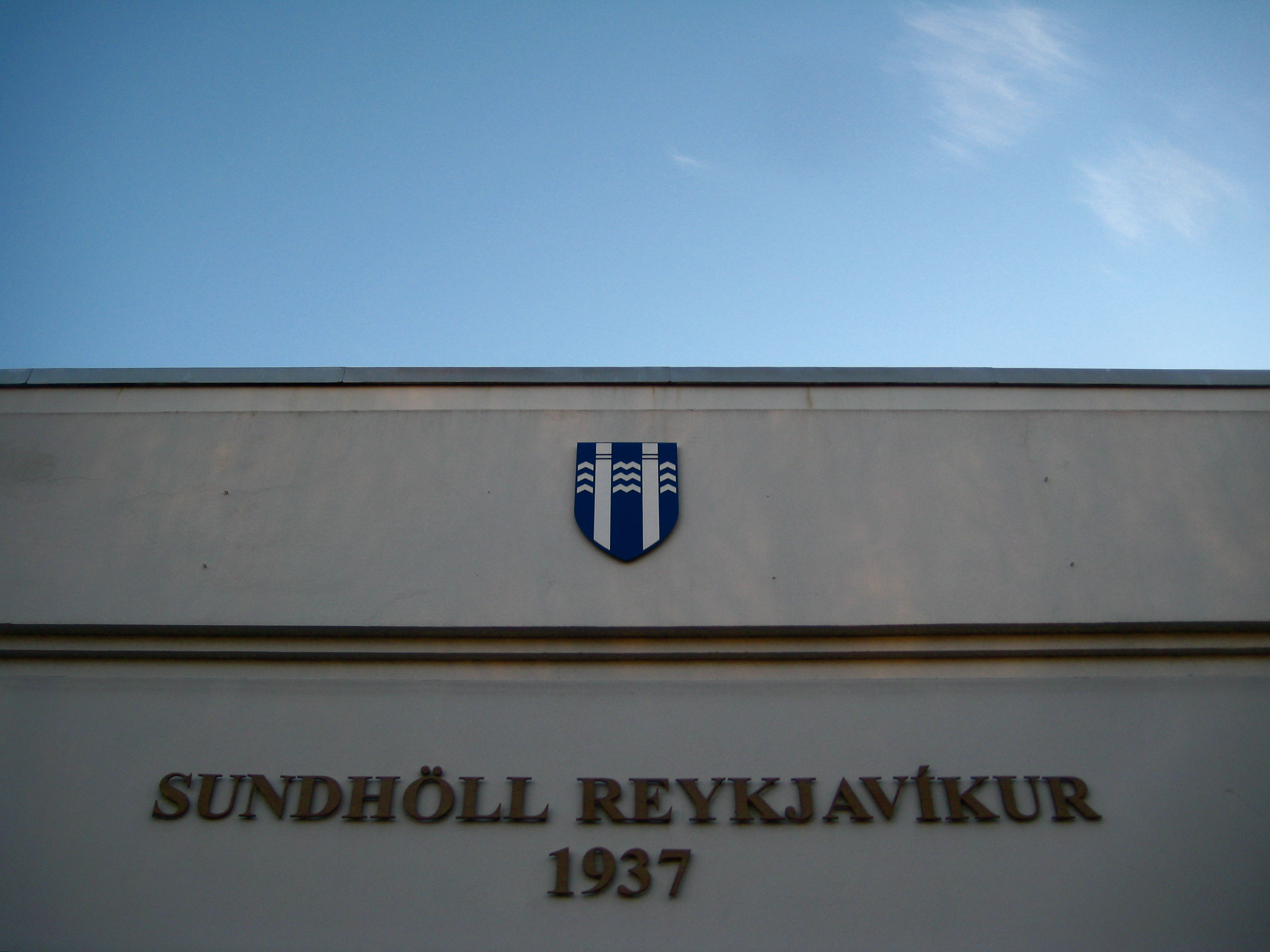 Sundhöll Reykjavíkur